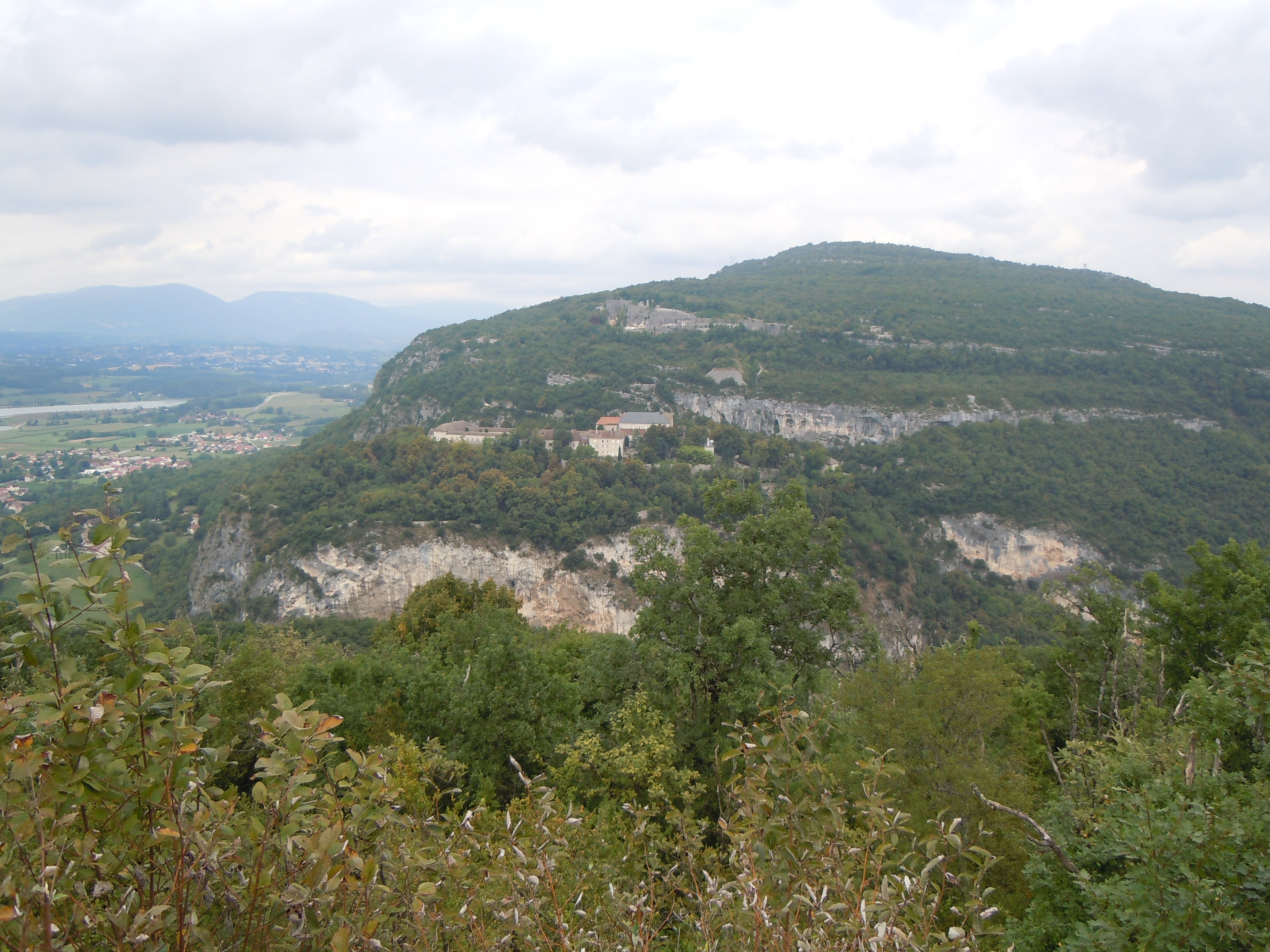 Chartreuse de Pierre-Châtel, en sortie des Gorges de la Balme à Virignin